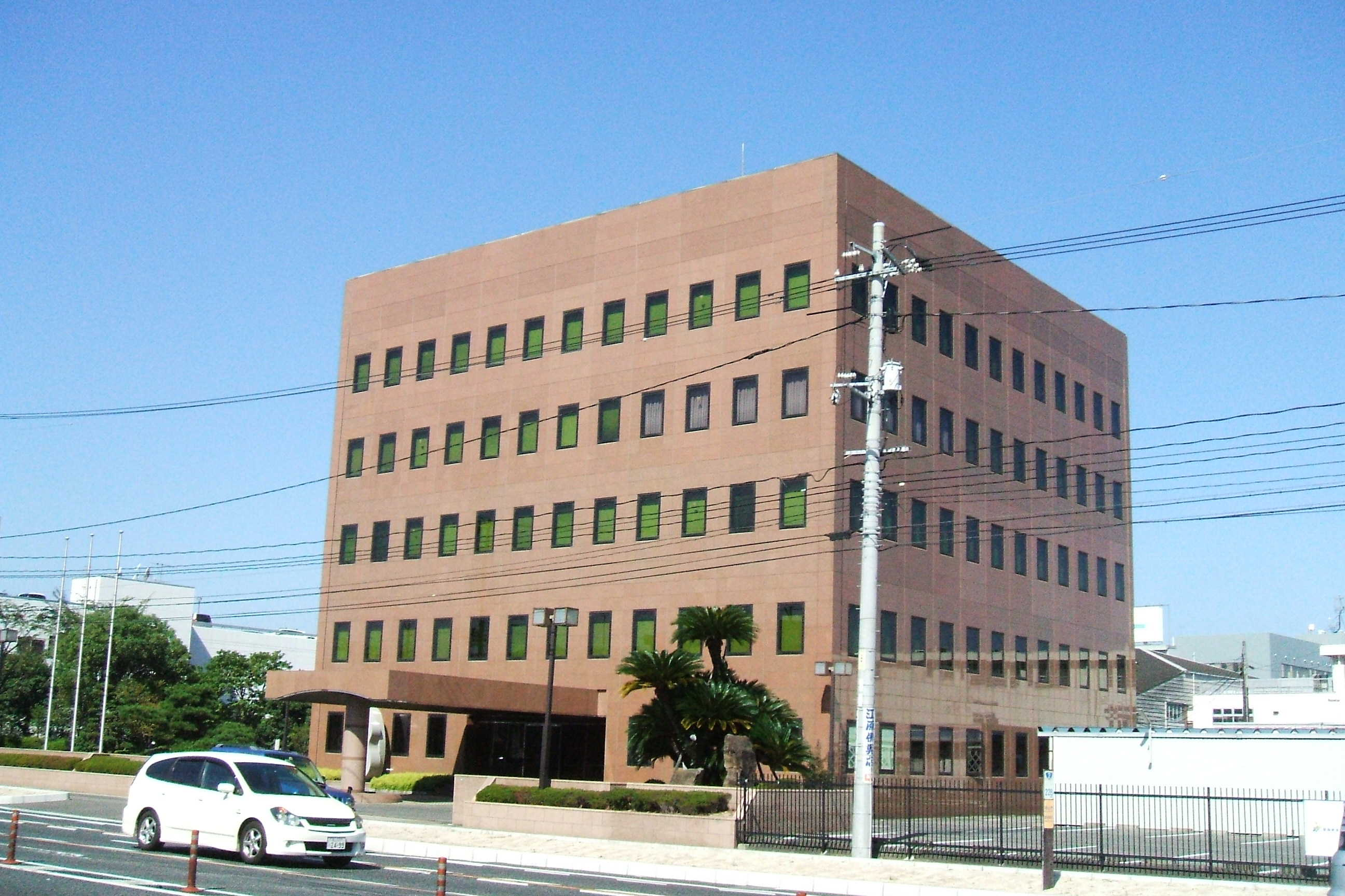 広島県福山市にある福山通運本社ビル